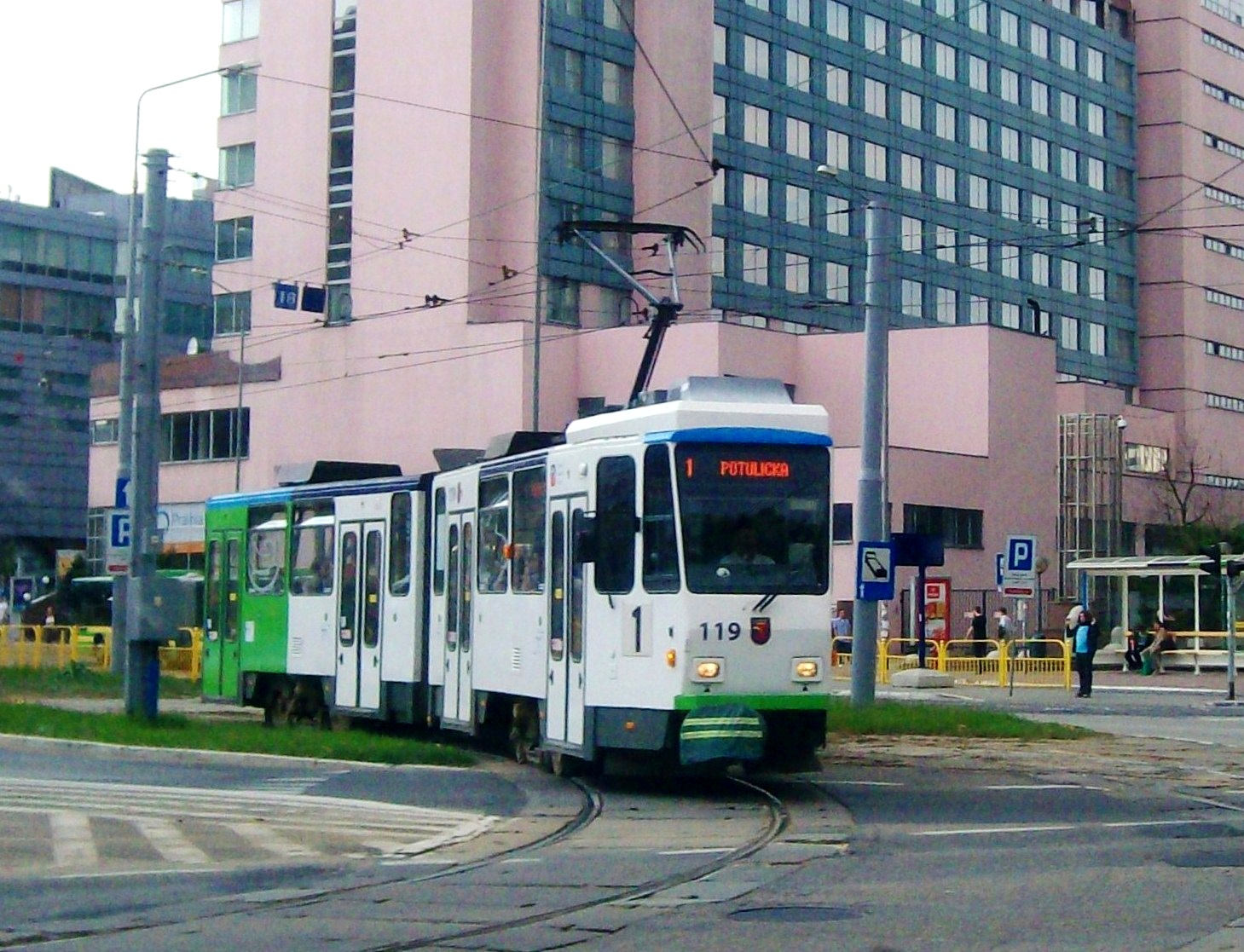 Tramvaj Tatra KT4Dt, linija št. 1 v Szczecinu